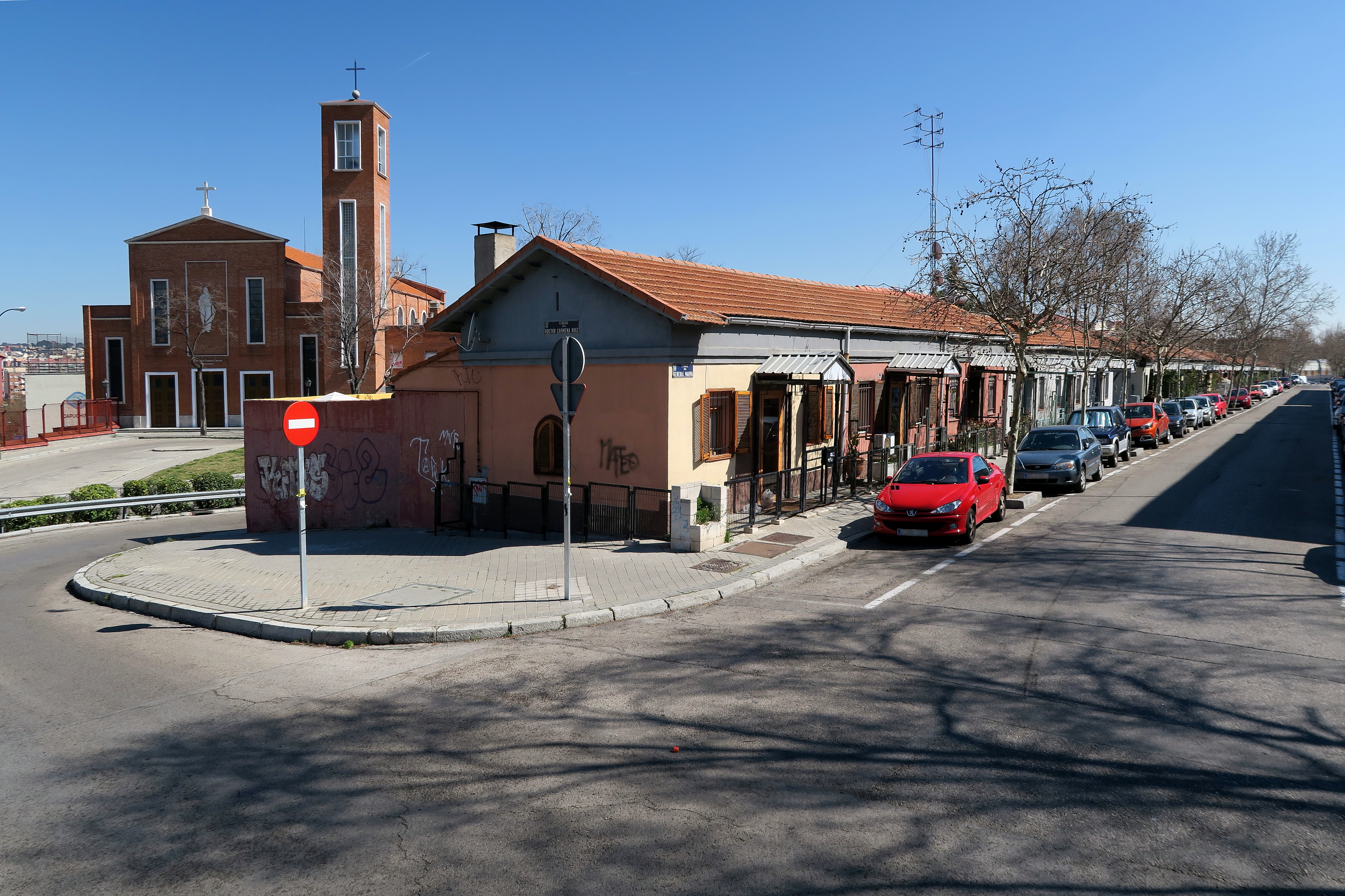 Moscardó (Madrid)